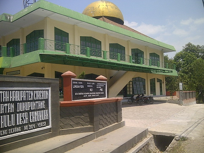 Kantor Kuwu Desa Cangkoak Jalan Nyi Ageng Serang, Desa Cangkoak, Kecamatan Dukupuntang, Kabupaten Cirebon, Jawa Barat